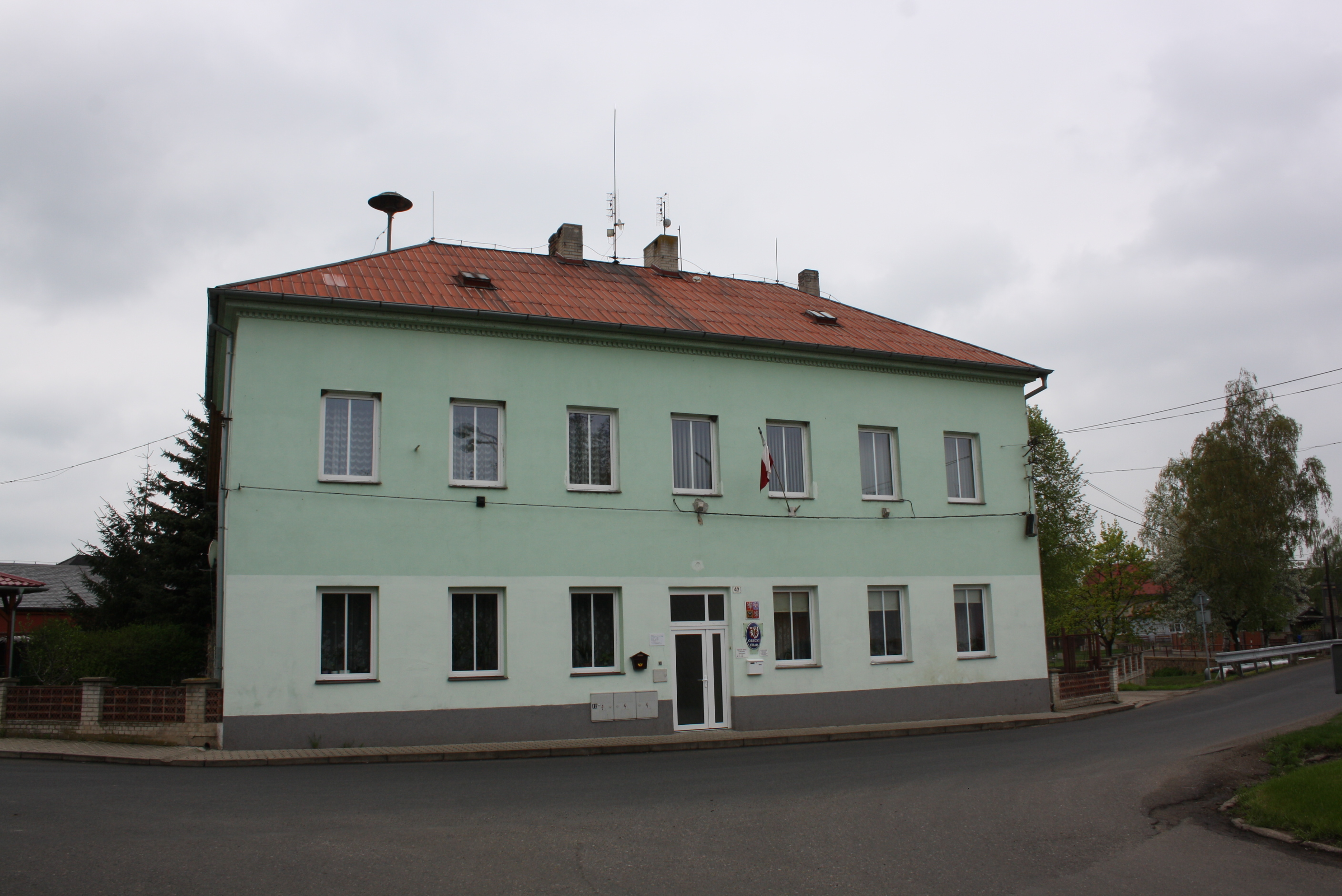 Obecní úřad v Lukavci v okrese Litoěmřice (dům číslo popisné 43).